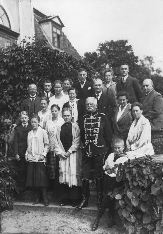 Generalfeldmarschall [August] von Mackensen wird am 6. Dezember 1929 80 Jahre alt. Der Generalfeldmarschall im Kreise seiner Familie.